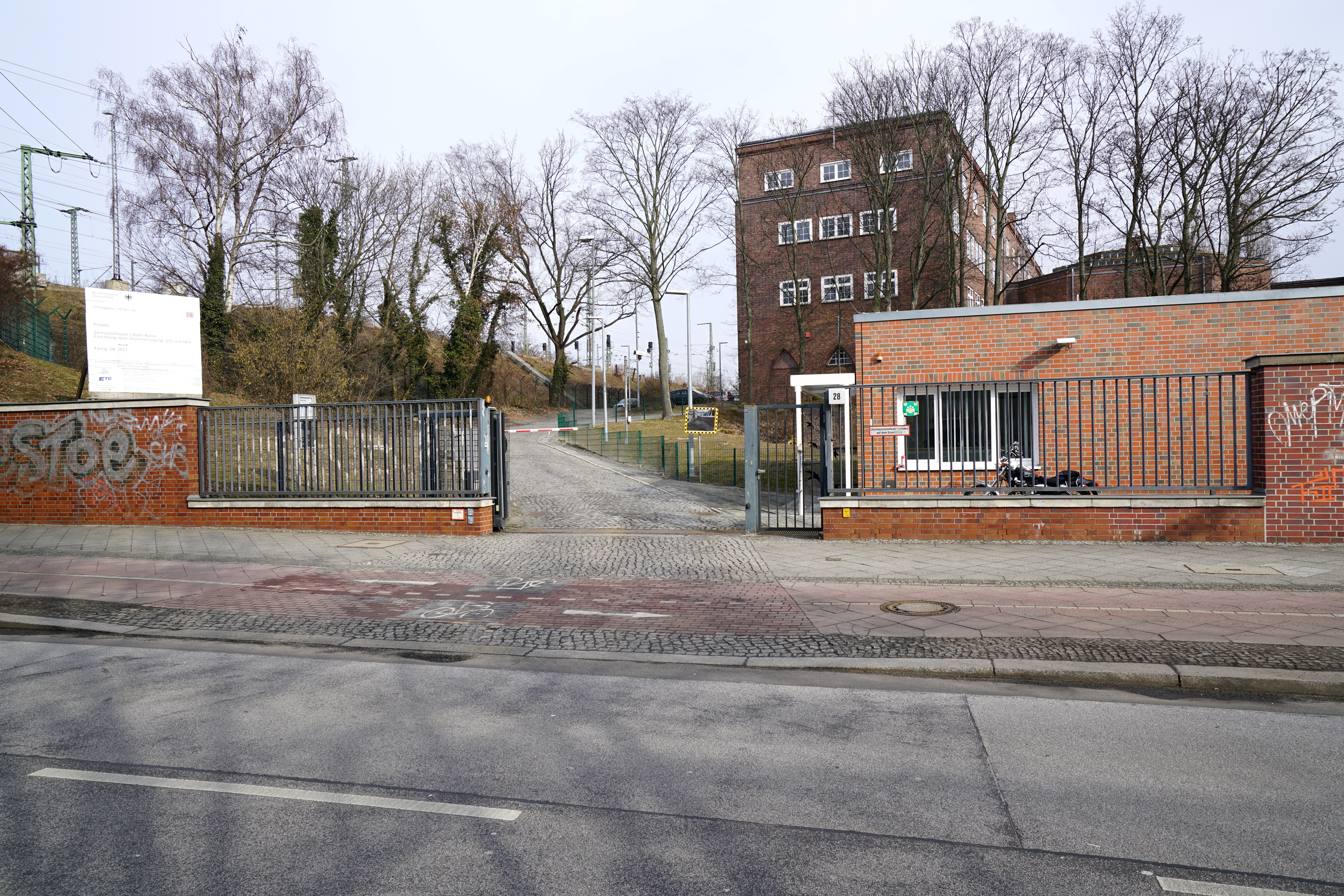 Die Betriebszentrale der S-Bahn Berlin der DB Netz AG im Ortsteil Berlin-Grunewald in der Halenseestraße 28 im Bezirk Charlottenburg-Wilmersdorf in Berlin